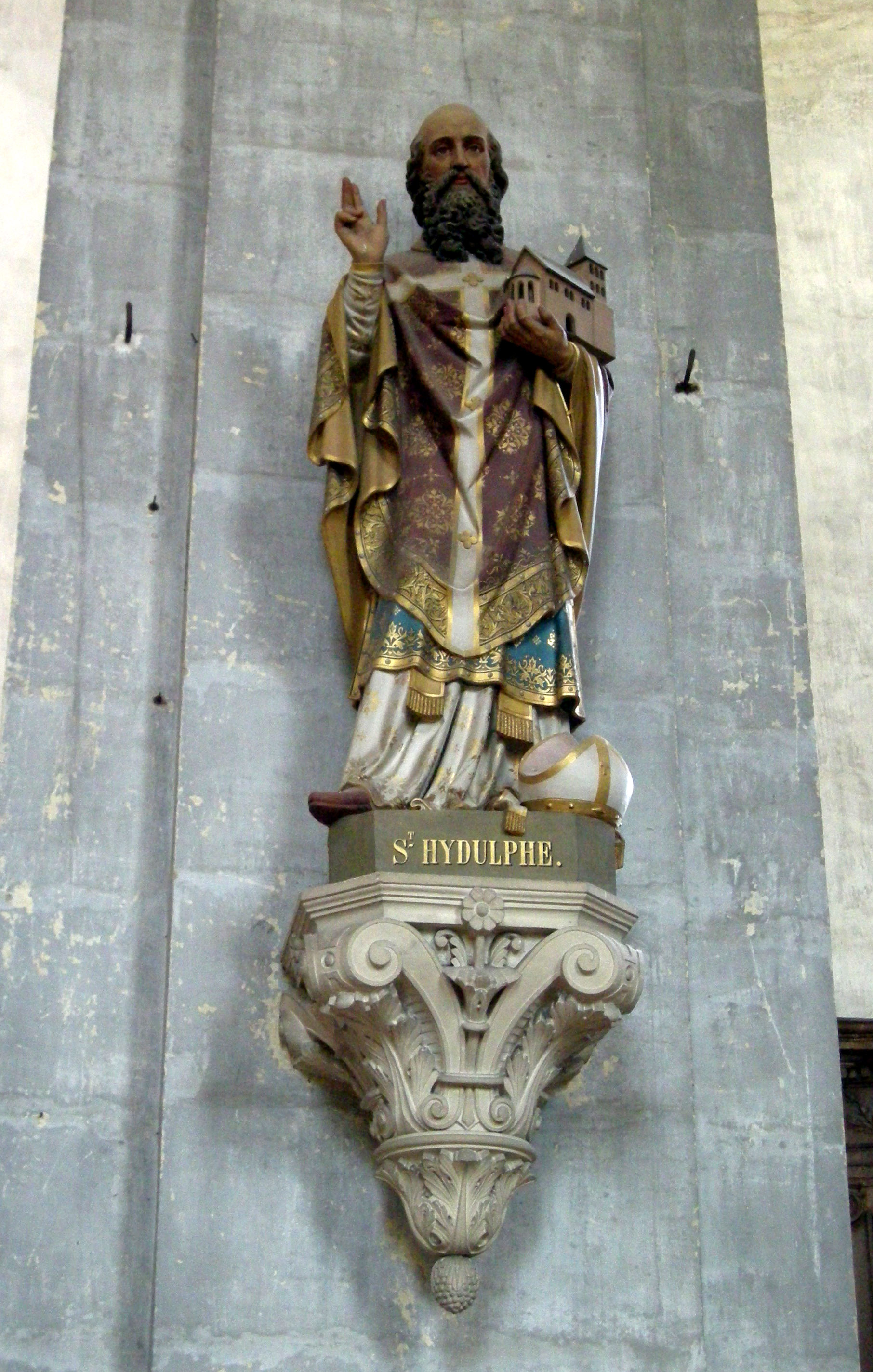 Statue de saint Hydulphe, polychrome du XIXe siècle, dans l'église abbatiale de Moyenmoutier (Vosges). Il porte une maquette de l'ancienne abbaye.